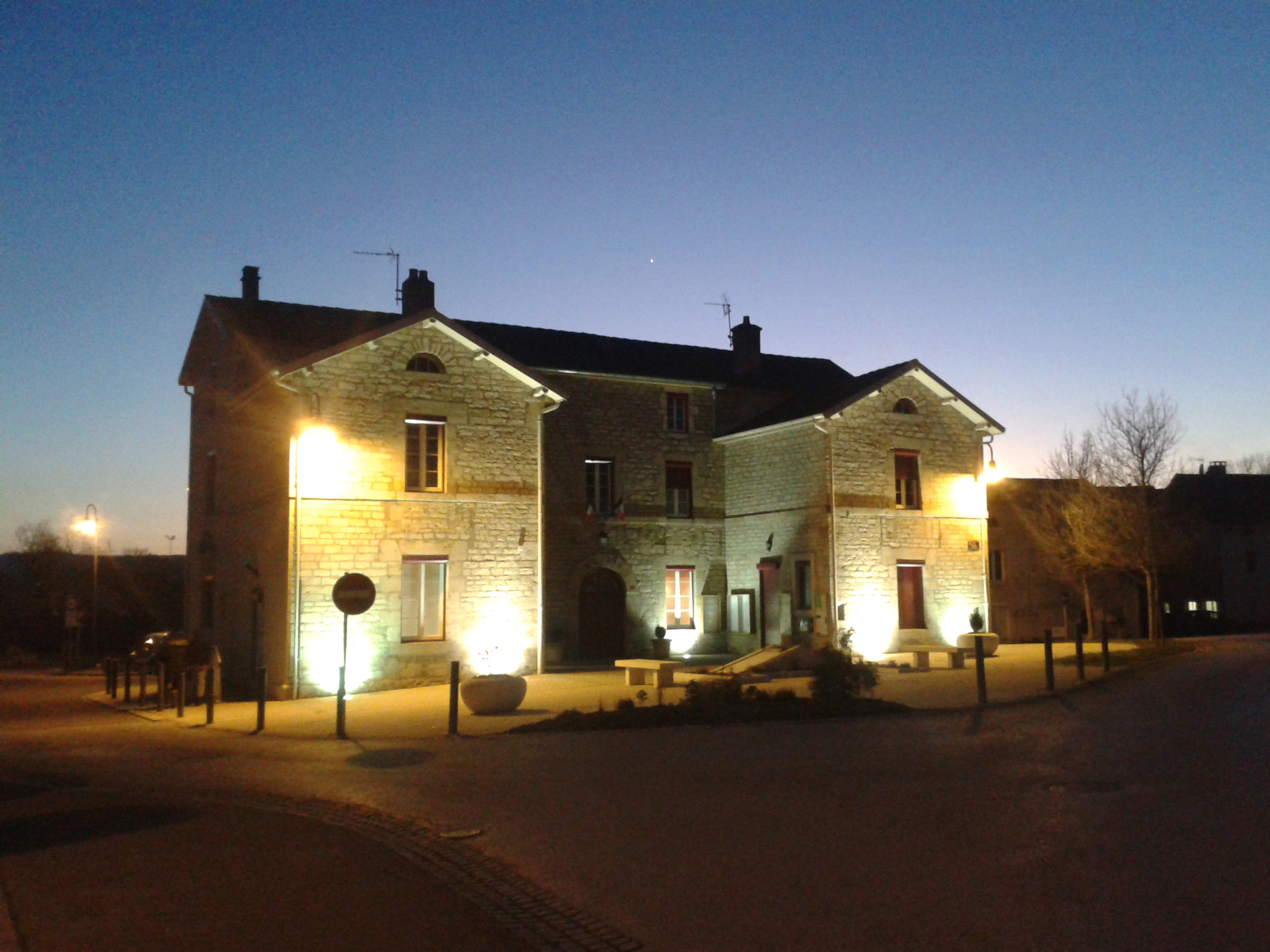 La mairie de Pusey (70)